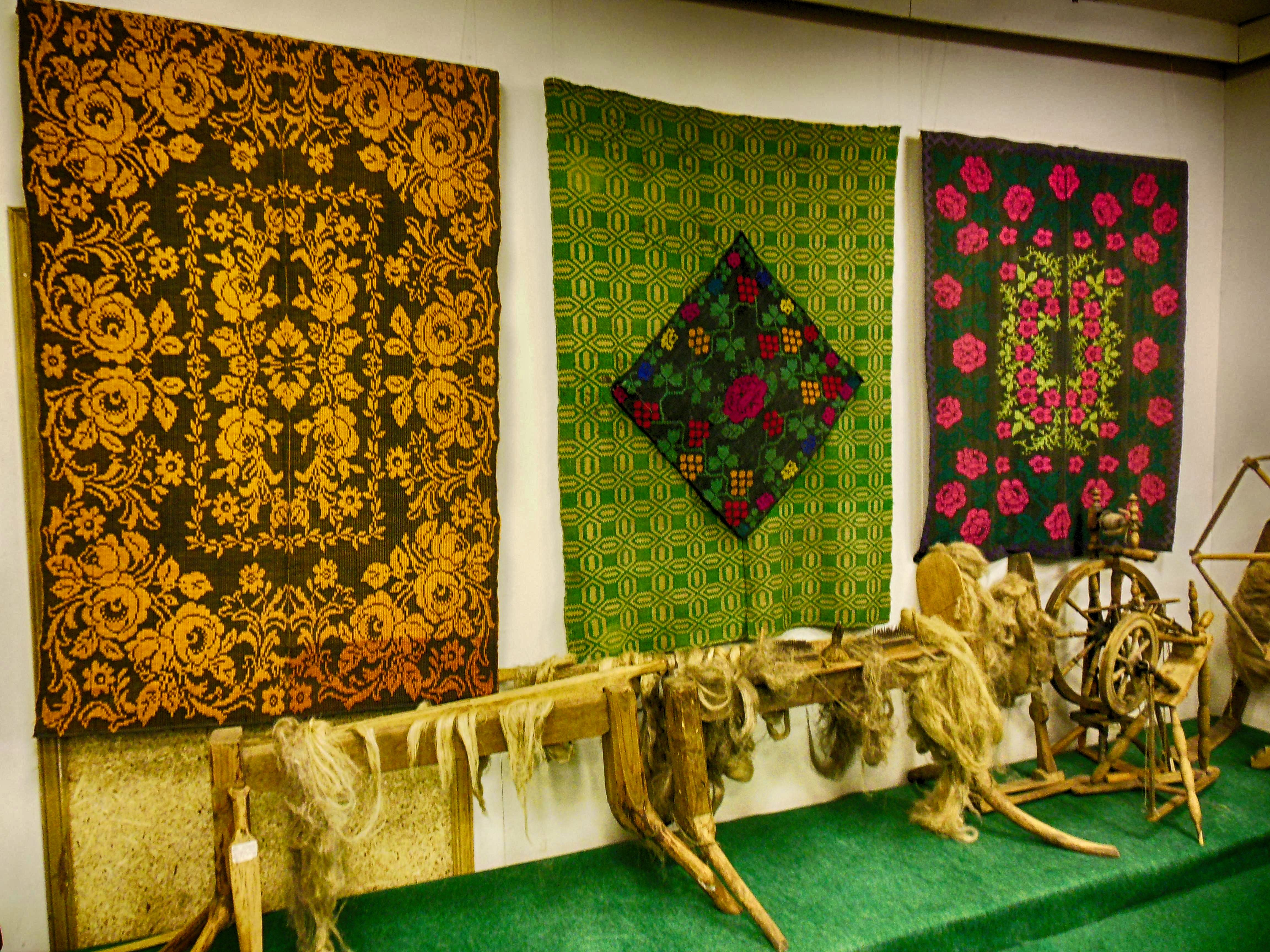 Беларуская (тарашкевіца): Гудзевіцкі літаратурна-краязнаўчы музэй